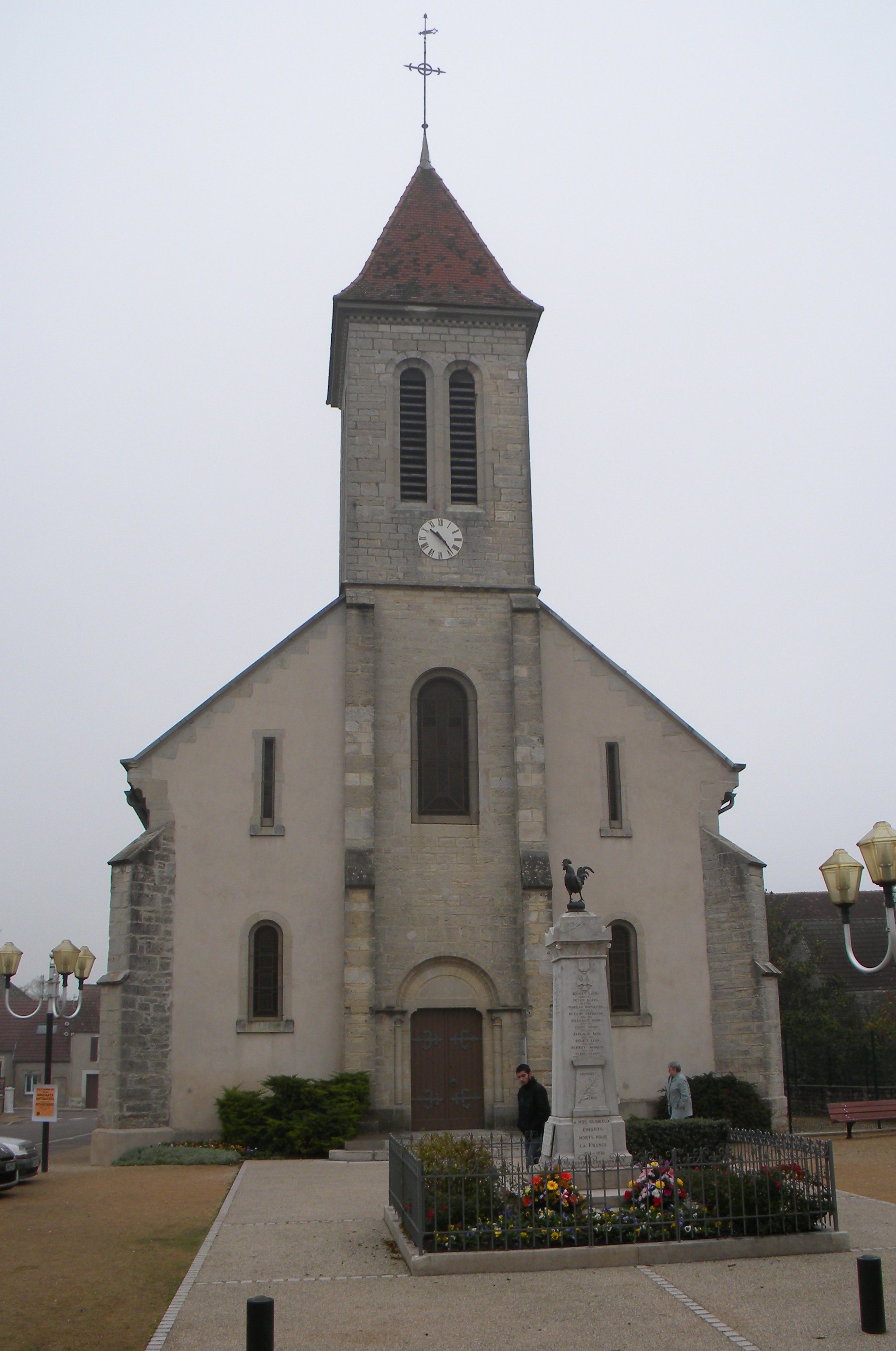 Flagey-Echézeaux Eglise